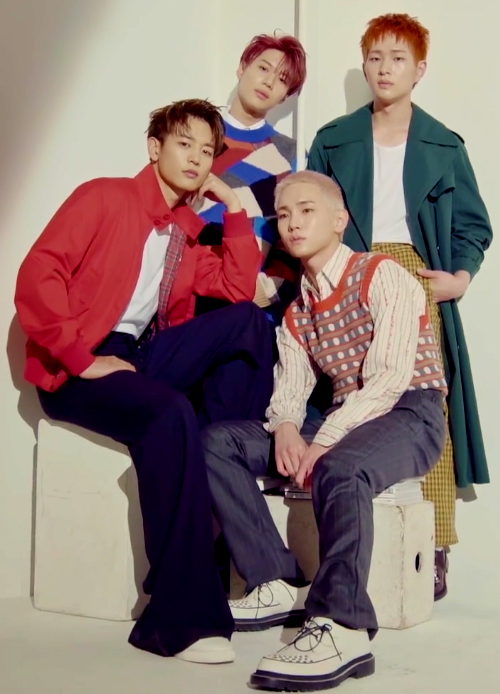 언제나 그 자리에서, 오늘도 샤이니.